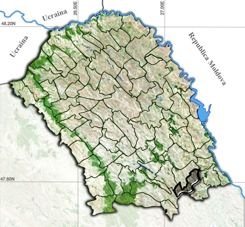 Hlipiceni jud Botosani.